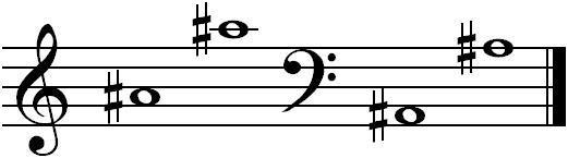 koobak